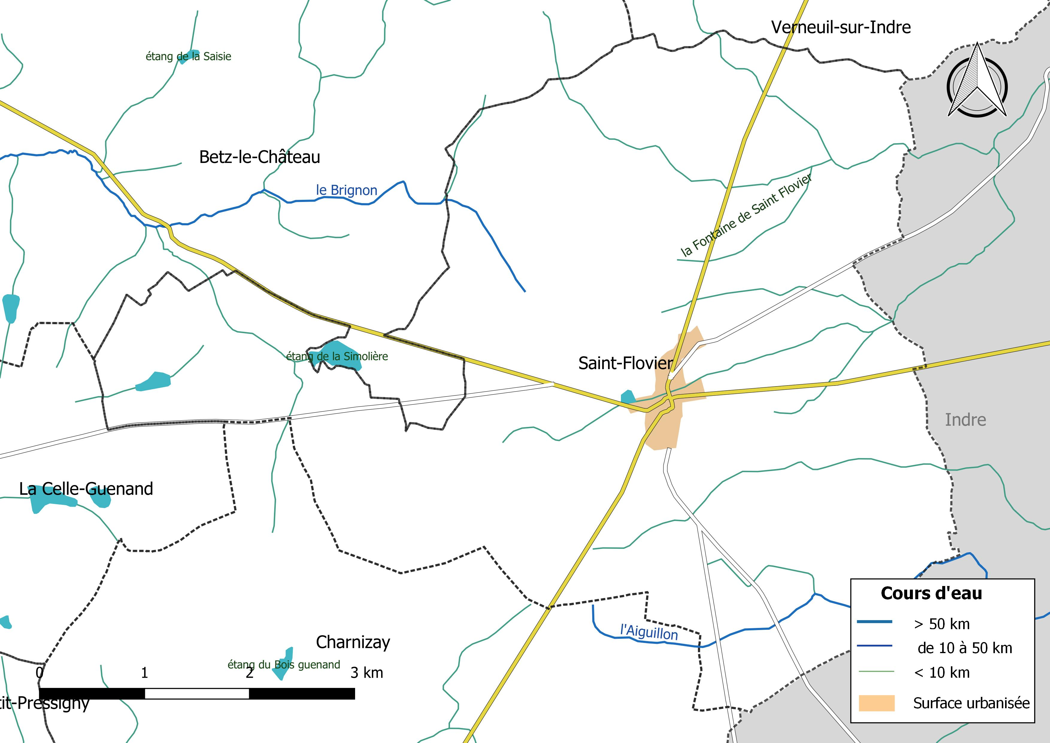 Carte du réseau hydrographique de la commune de Saint-Flovier (France).